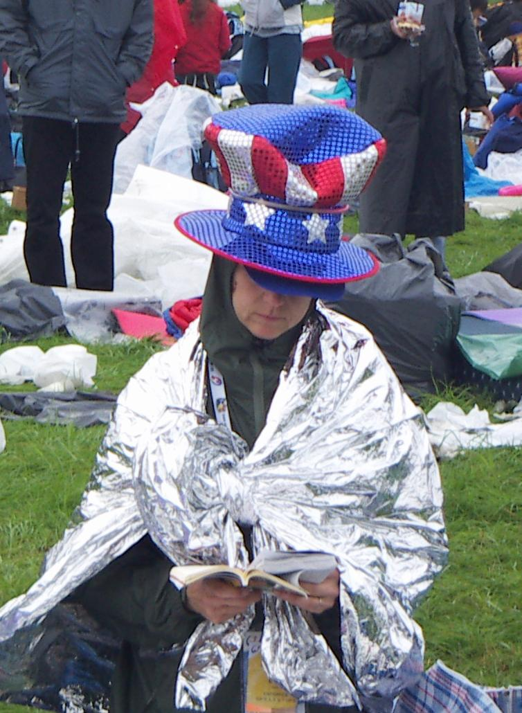 Muller pregando en Marienfeld